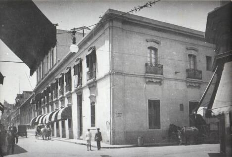 Vista de las casas que forman parte de la Manzana de las Luces, en esa época pertenecían a la Universidad de Buenos Aires. Hoy son parte del Museo.